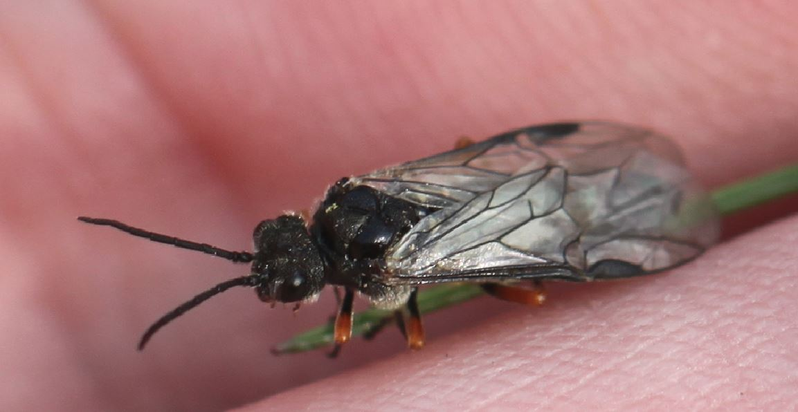 Pflanzenwespe Dolerus cf. gonager am 8. April 2019 in der Schwetzinger Hardt